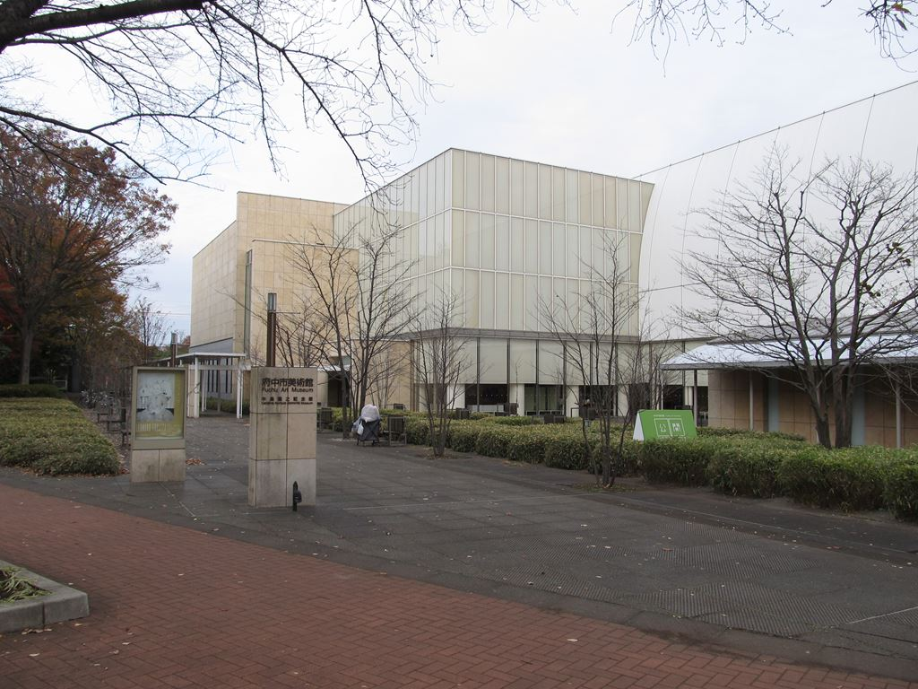 府中市美術館 府中の森公園内